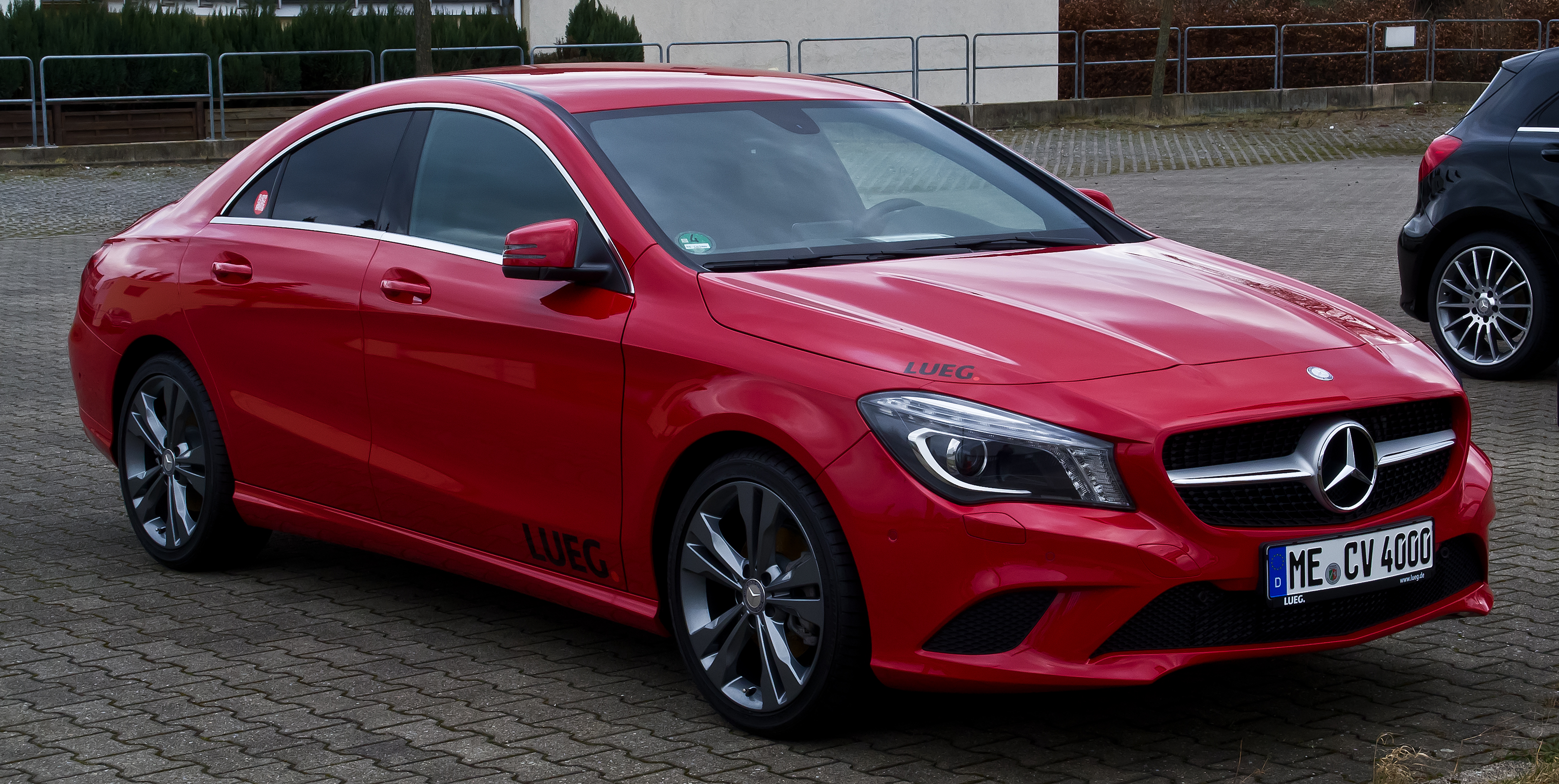 Mercedes-Benz CLA 180 Urban (C 117)